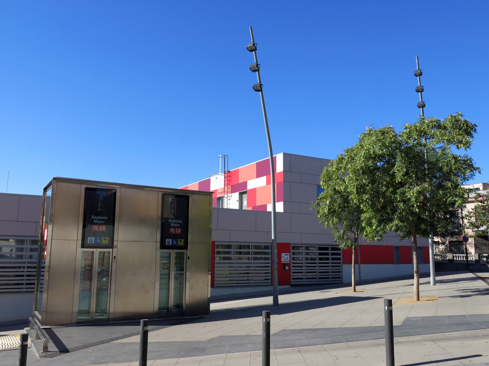 Metro Església Major (Santa Coloma de Gramenet)